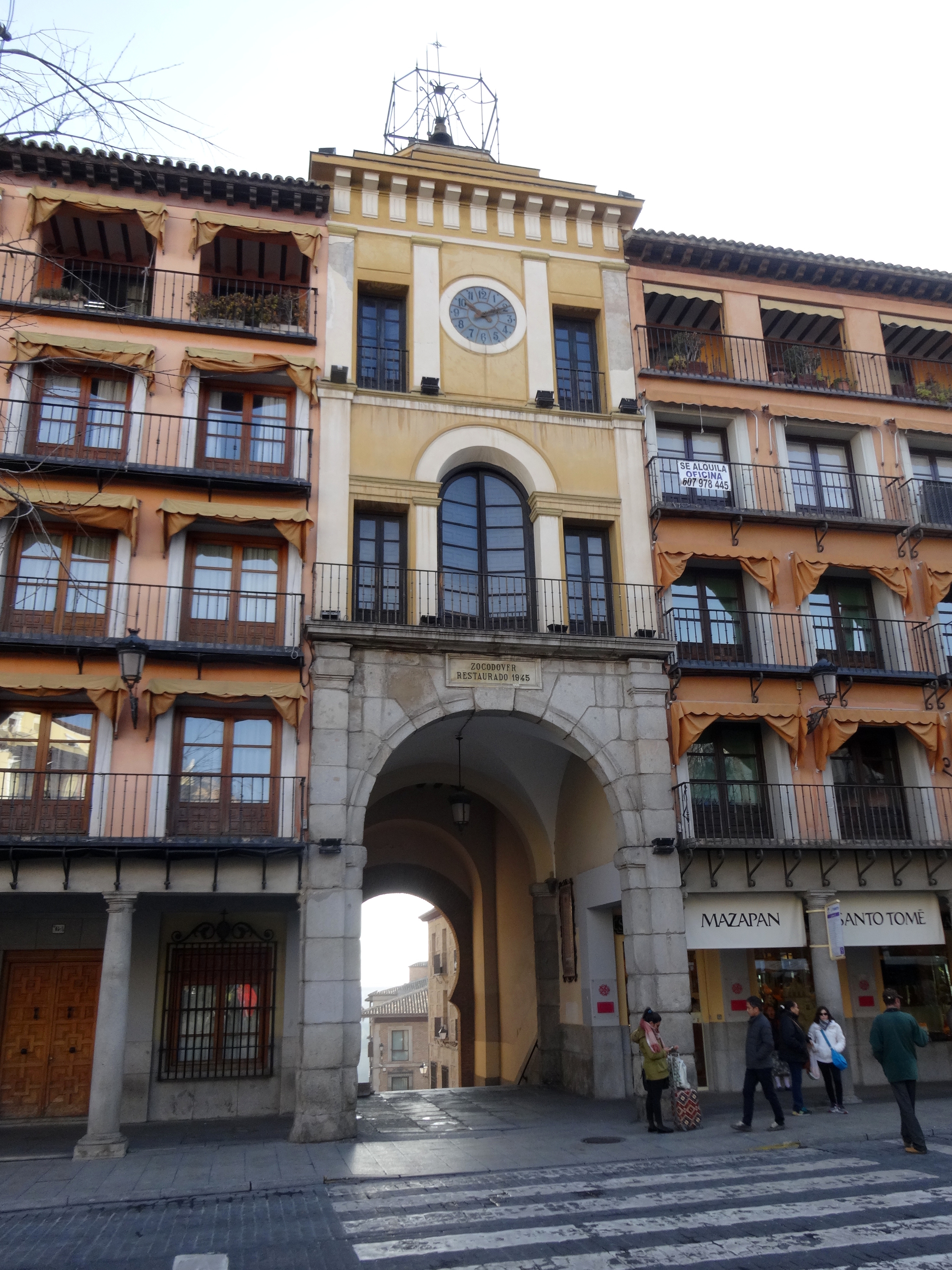 Plaza del Zocodover, Toledo (España).